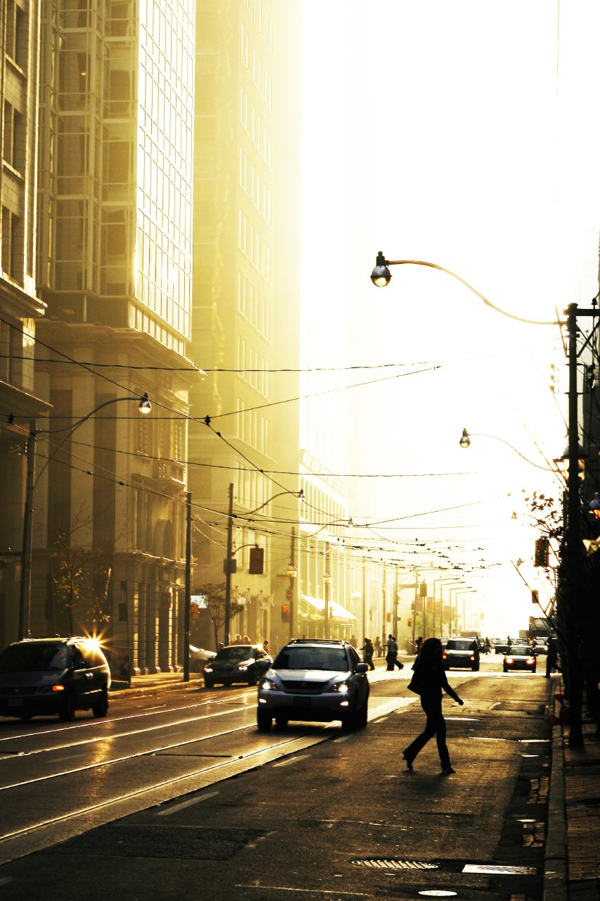 Adelaide Street, Toronto, Canada